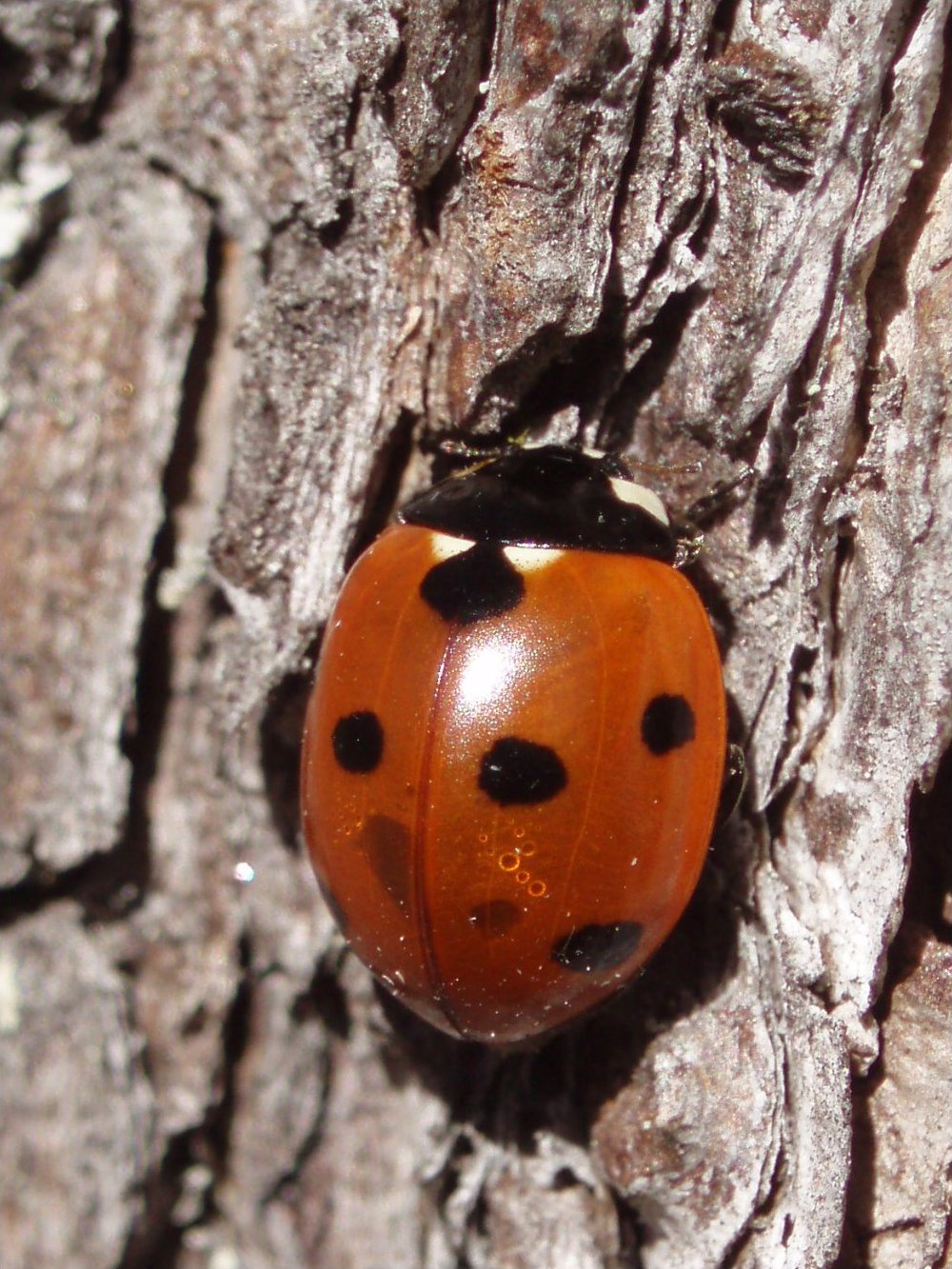 ladybug,(coccinella septempunctata), Coccinellidae